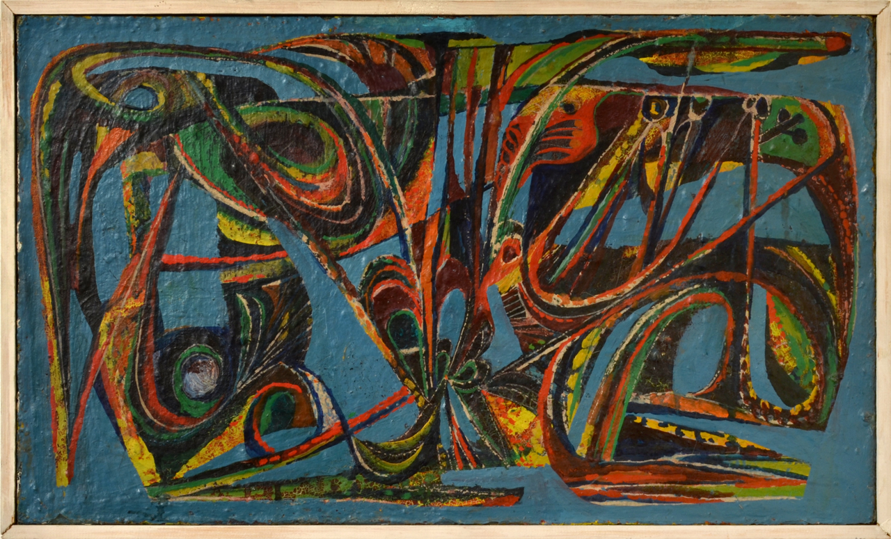 Jiří Mrázek, Tichomoří, olej, plátno, 32x54 cm, 1948-49